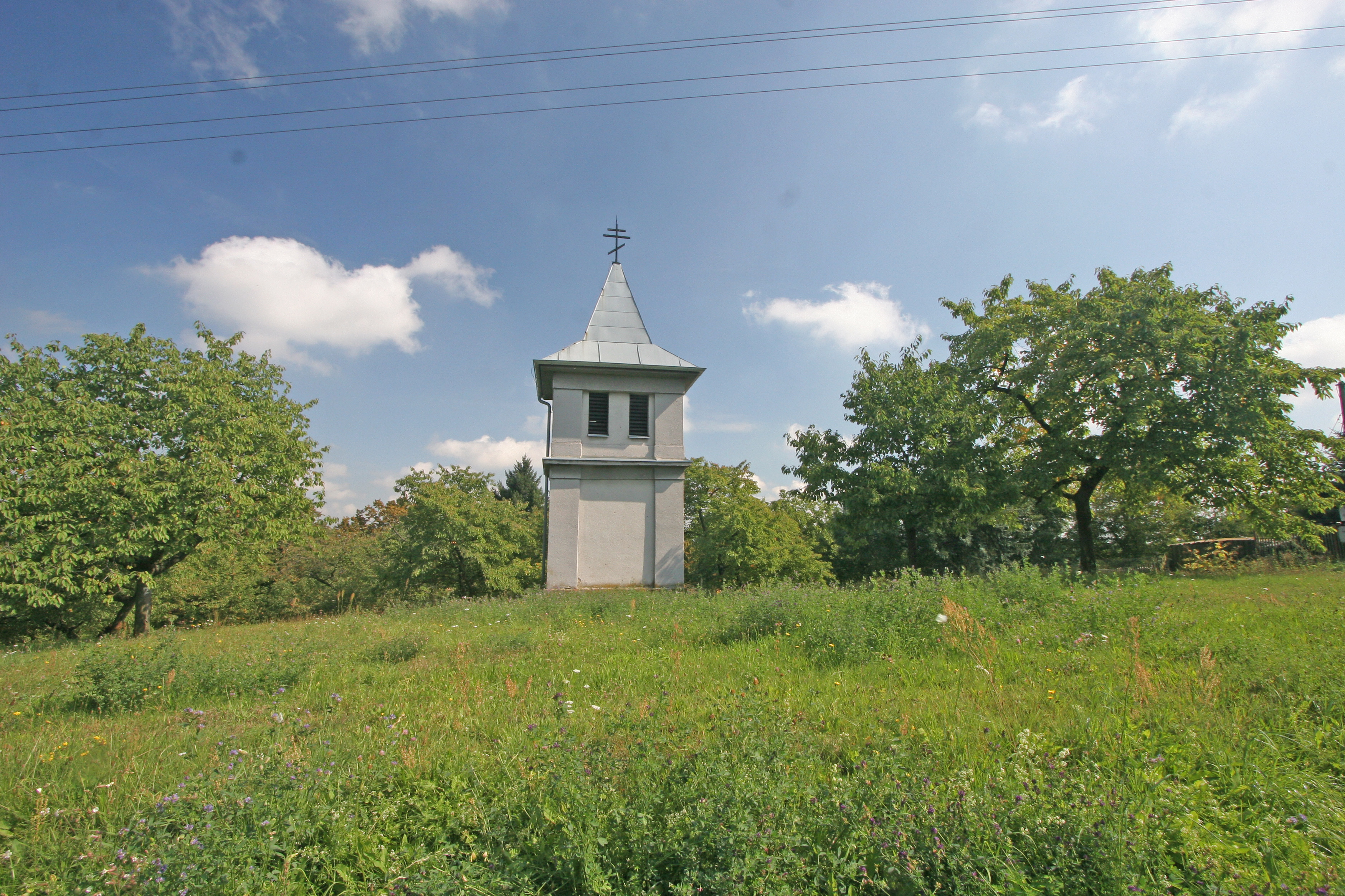 Kojice zvonice